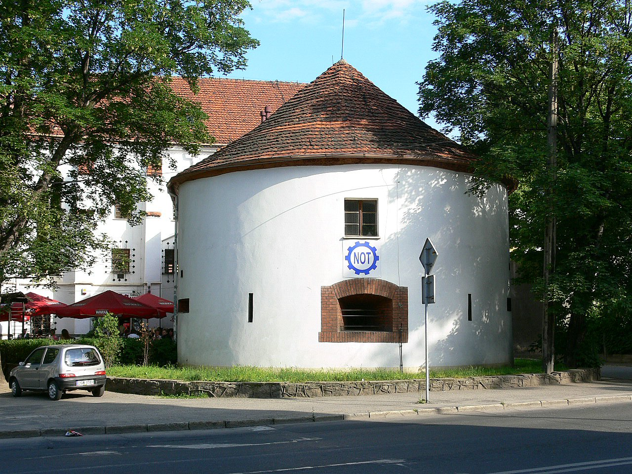 Świdnica - Baszta Strzegomska (obecnie reatauracja) i kościół św. Barbary (obecnie Dom Technika)